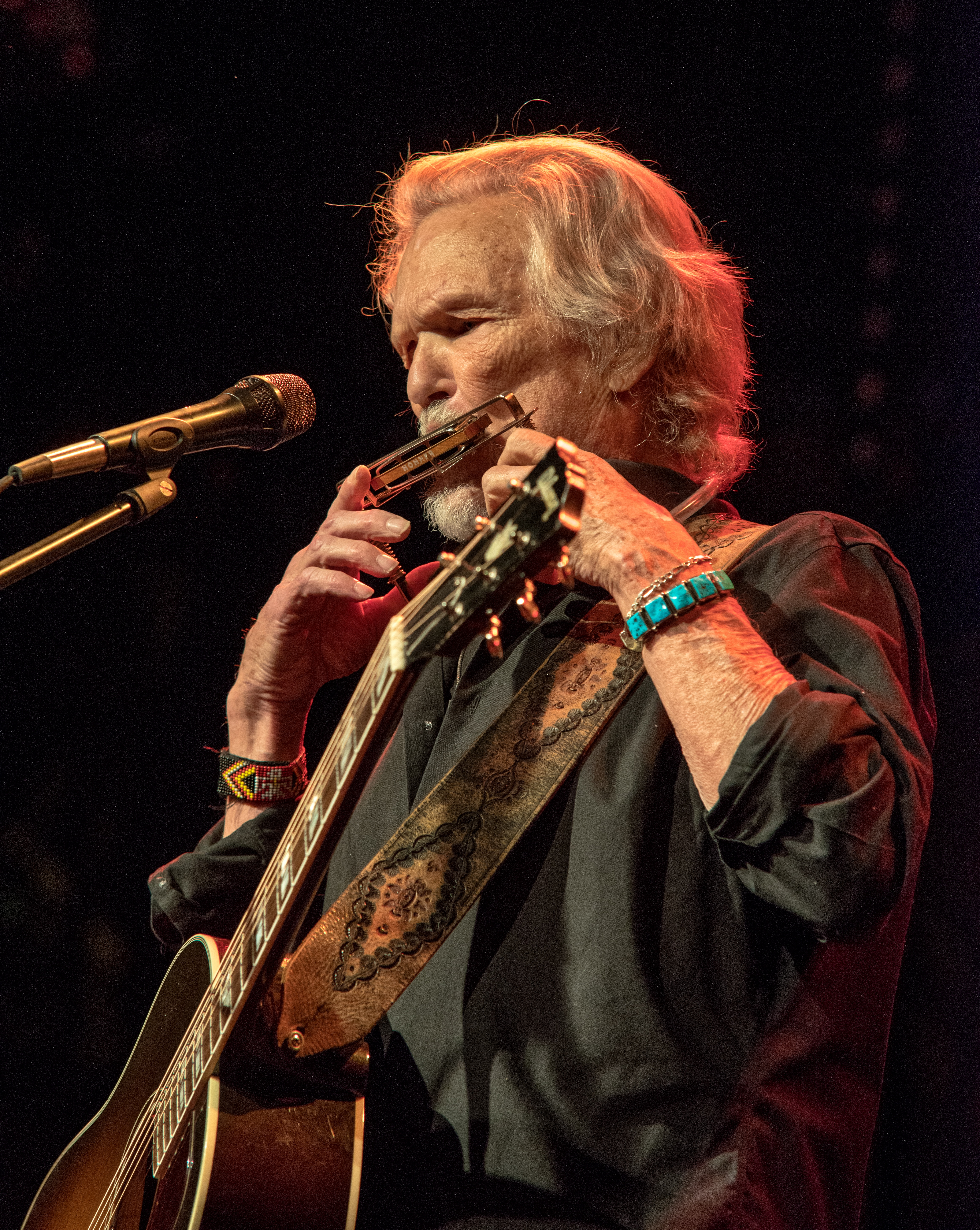 Bilder vom Zelt Musik Festival 2017 in Freiburg im Breisgau Kris Kristofferson